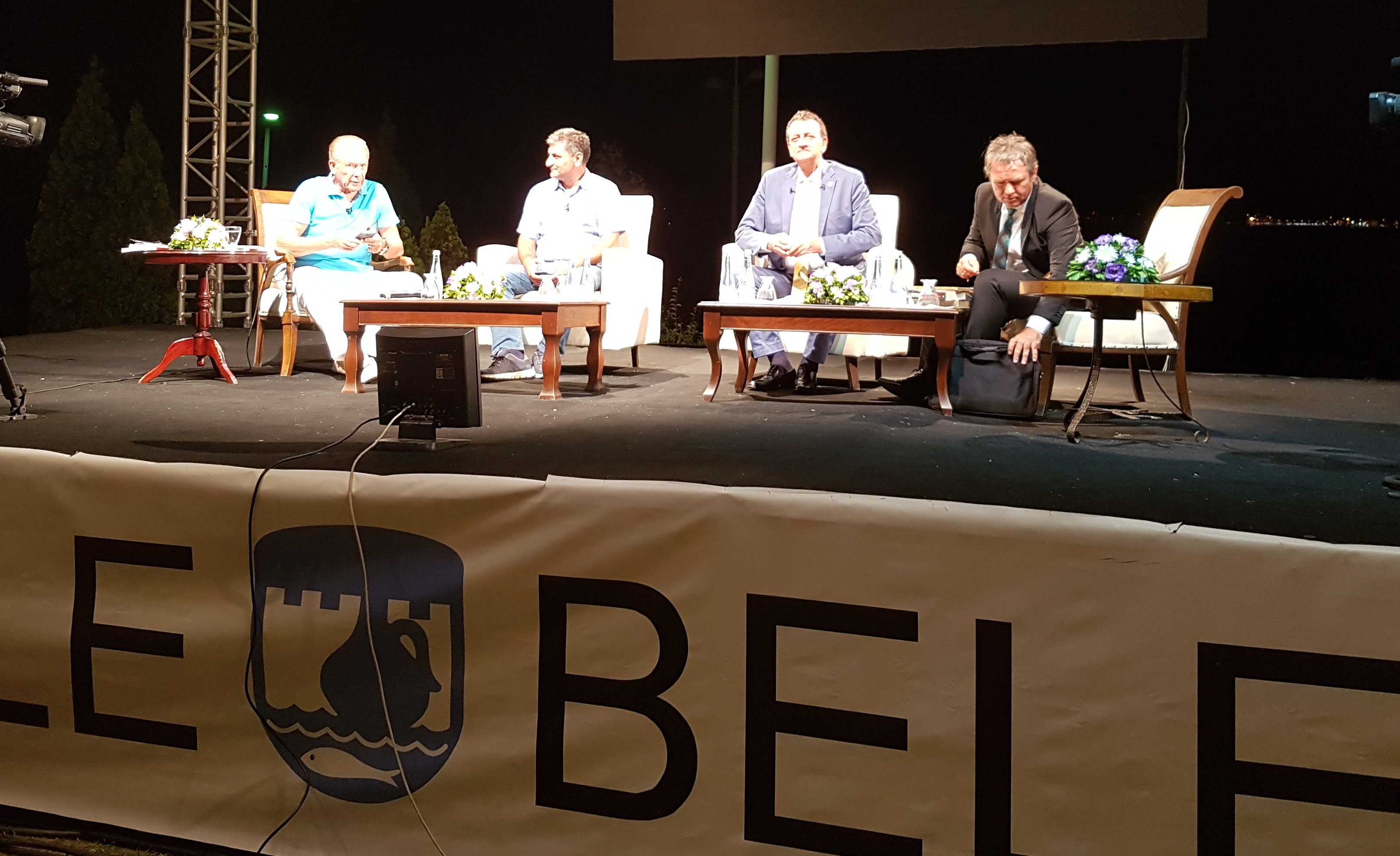 Halk Arenası 20170828